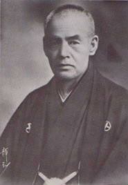 田辺玄平肖像